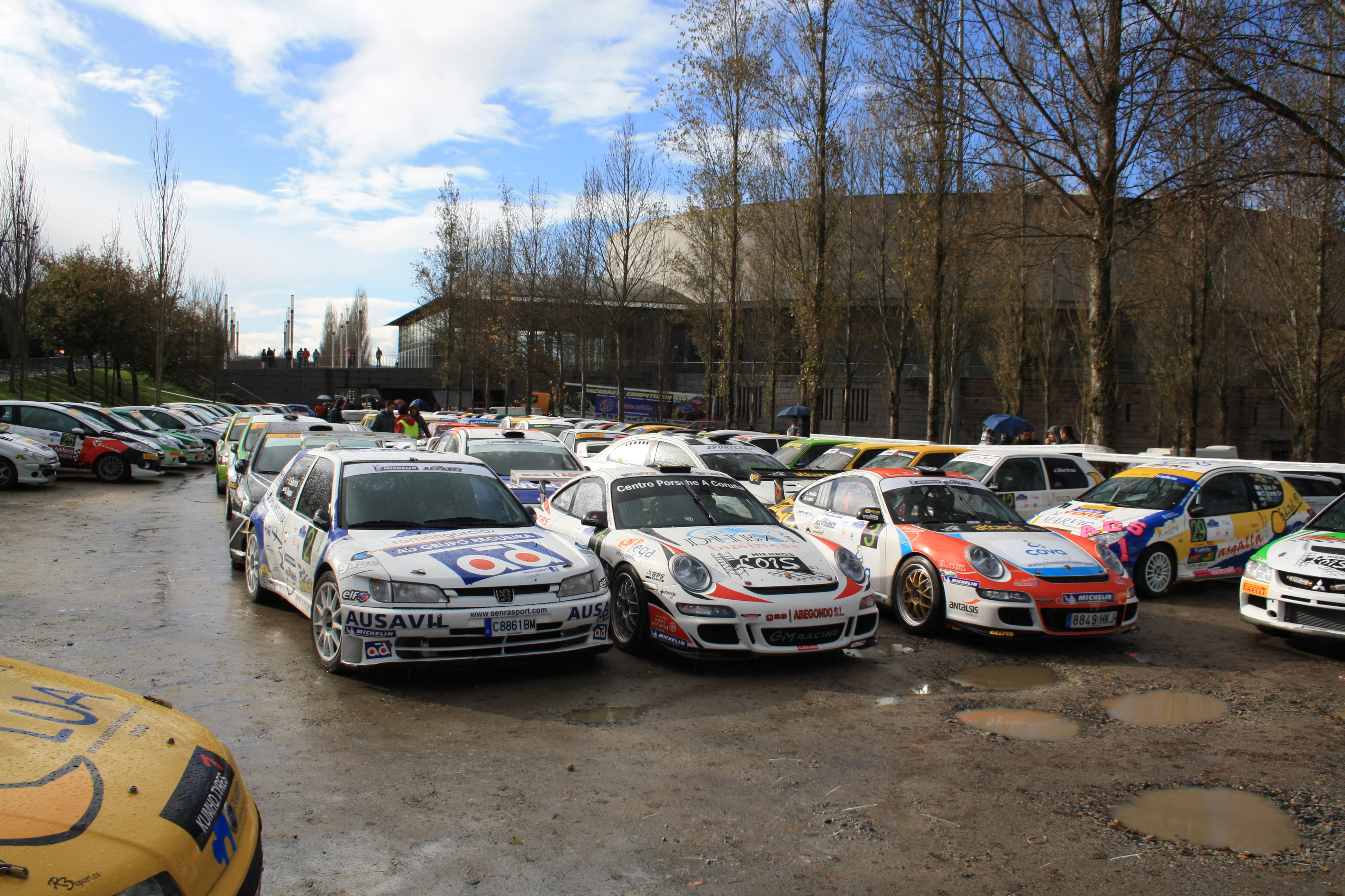 Rally Botafumeiro 2012 - parque cerrado en el Multiusos do Sar. Santiago de Compostela.